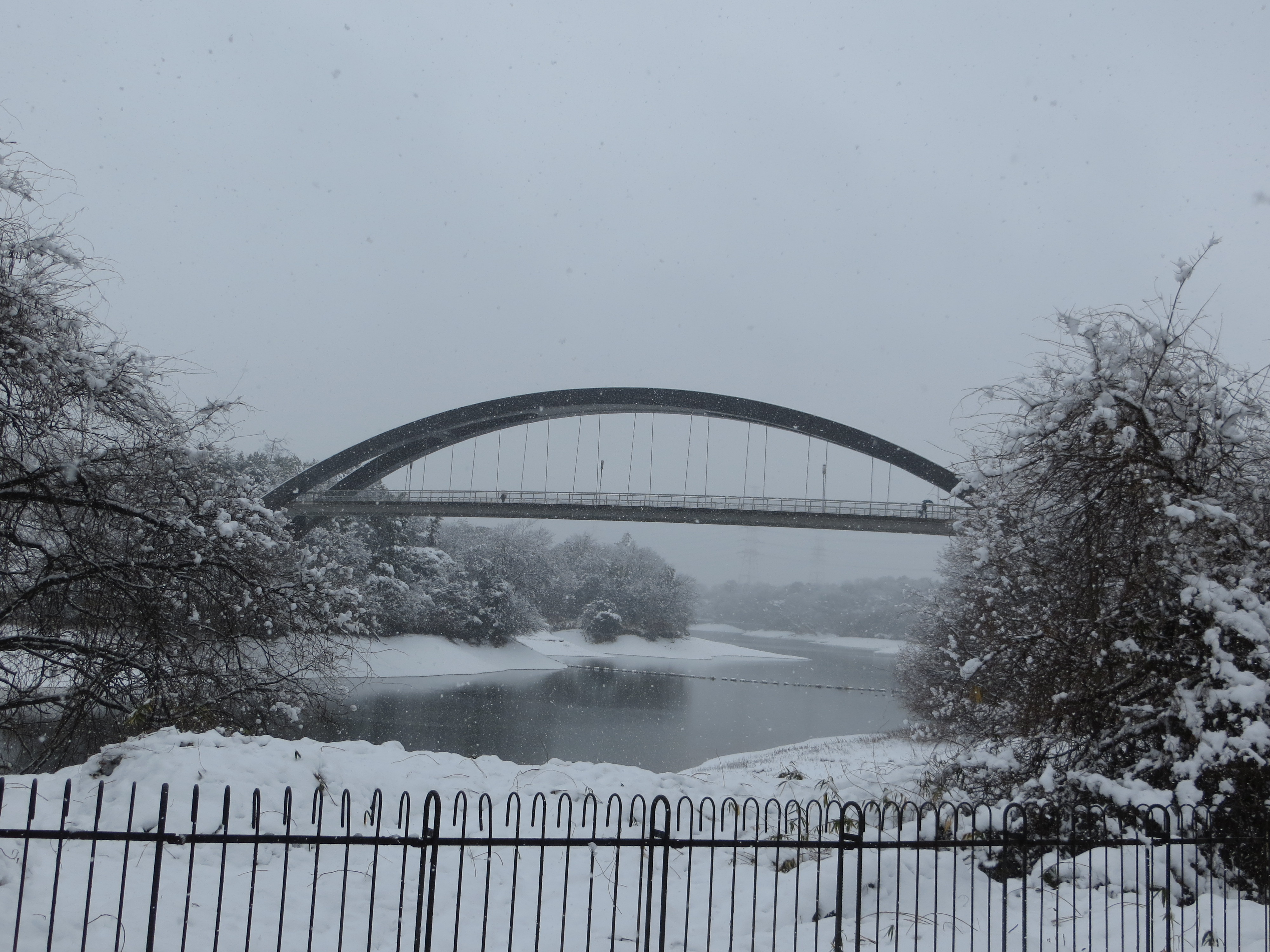 被写体は大阪府和泉市にある光明池大橋です。2014年2月14日の積雪時、光明池緑地の休憩所より撮影しました。